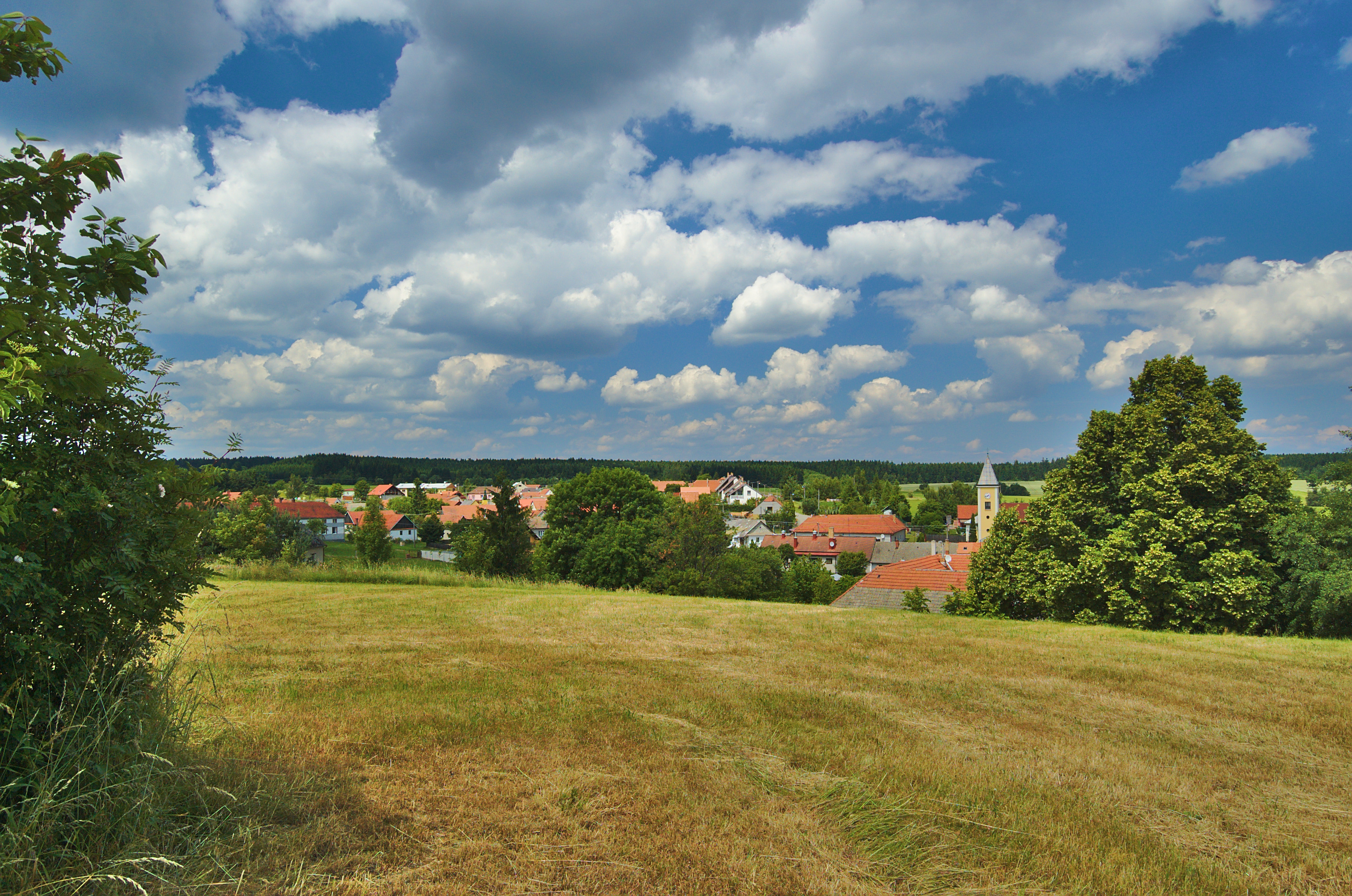 Pohled na Bukovou z jihu, okres Prostějov